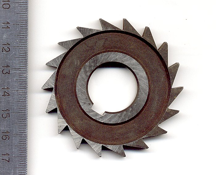 Frez tarczowy Own work